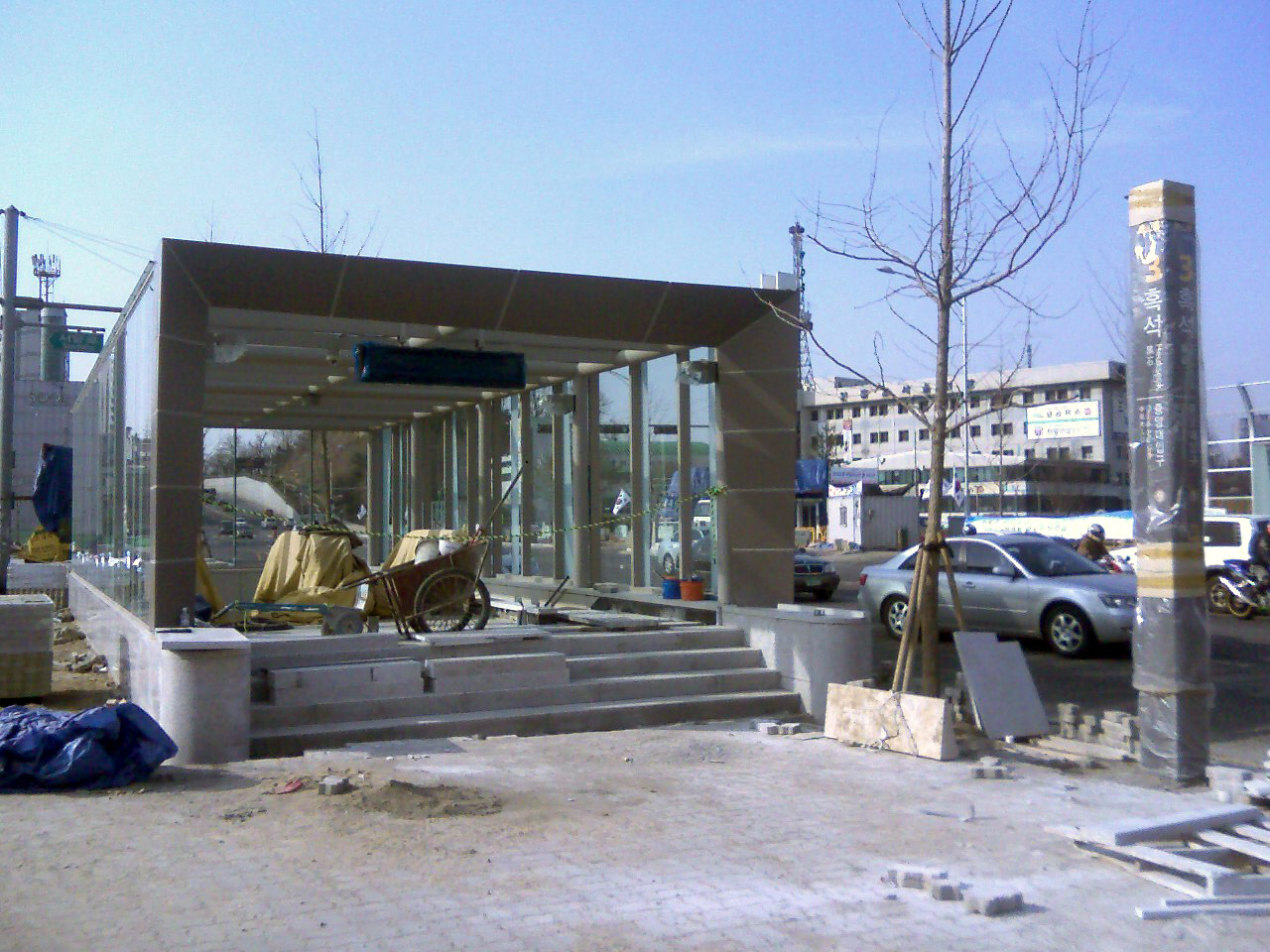 Heukseok Station (Chung-ang Univ.) Exit No.3 (ja ko)